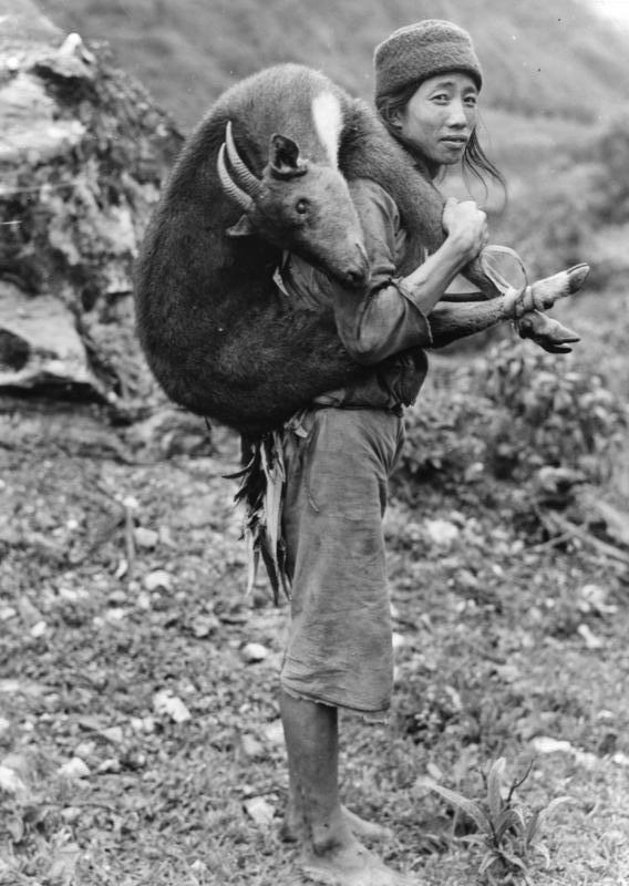 Tibetexpedition, Tibeter mit erlegtem Goral Goral